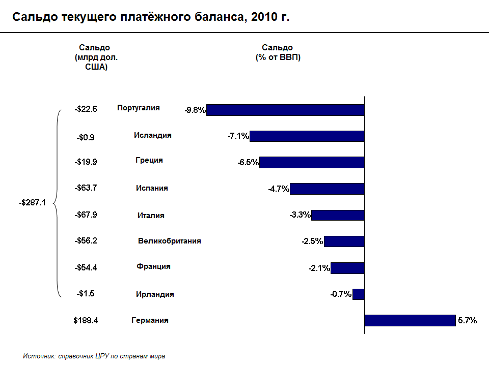 Текущий торговый баланс отражает соотношение чистого импорта и экспорта. В том случае, если экспорт выше импорта, сальдо торгового баланса является положительным; в противном случае оно является отрицательным. В Германии сальдо торгового баланса является положительным, т.е. Германия - чистый экспортёр. Другие страны, которые часто упоминаются в связи с кризисом являются, как правило, чистыми импортёрами. В торговом балансе учитываются импорт как товаров, так и услуг. Страны, являющиеся чистыми импортёрами товаров и услуг, должны привлекать кредитные средства для их покупки. Страны с положительным сальдо торгового баланса используют средства, полученные от продажи товаров, для выдачи кредитов странам с отрицательным торговым балансом, чтобы они могли финансировать потребление. Бен Бернанке объясняет теорию международной торговли в своей речи о мировом избытке сбережений (2005 г.): Экономист Пол Кругман приводит краткое содержмание речи в статье "Месть сбережений" (март 2009 г.)